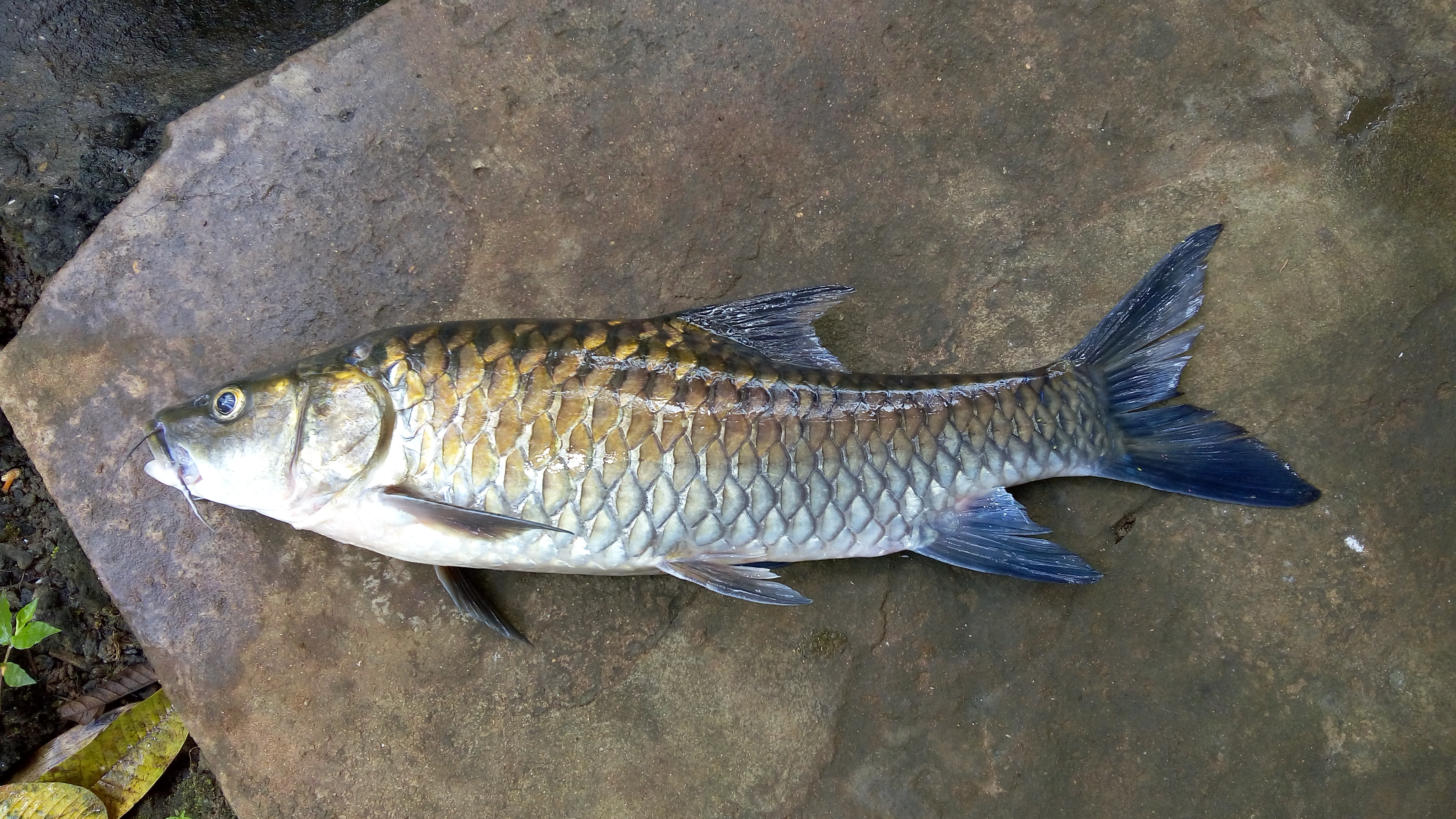 Kuyil fish